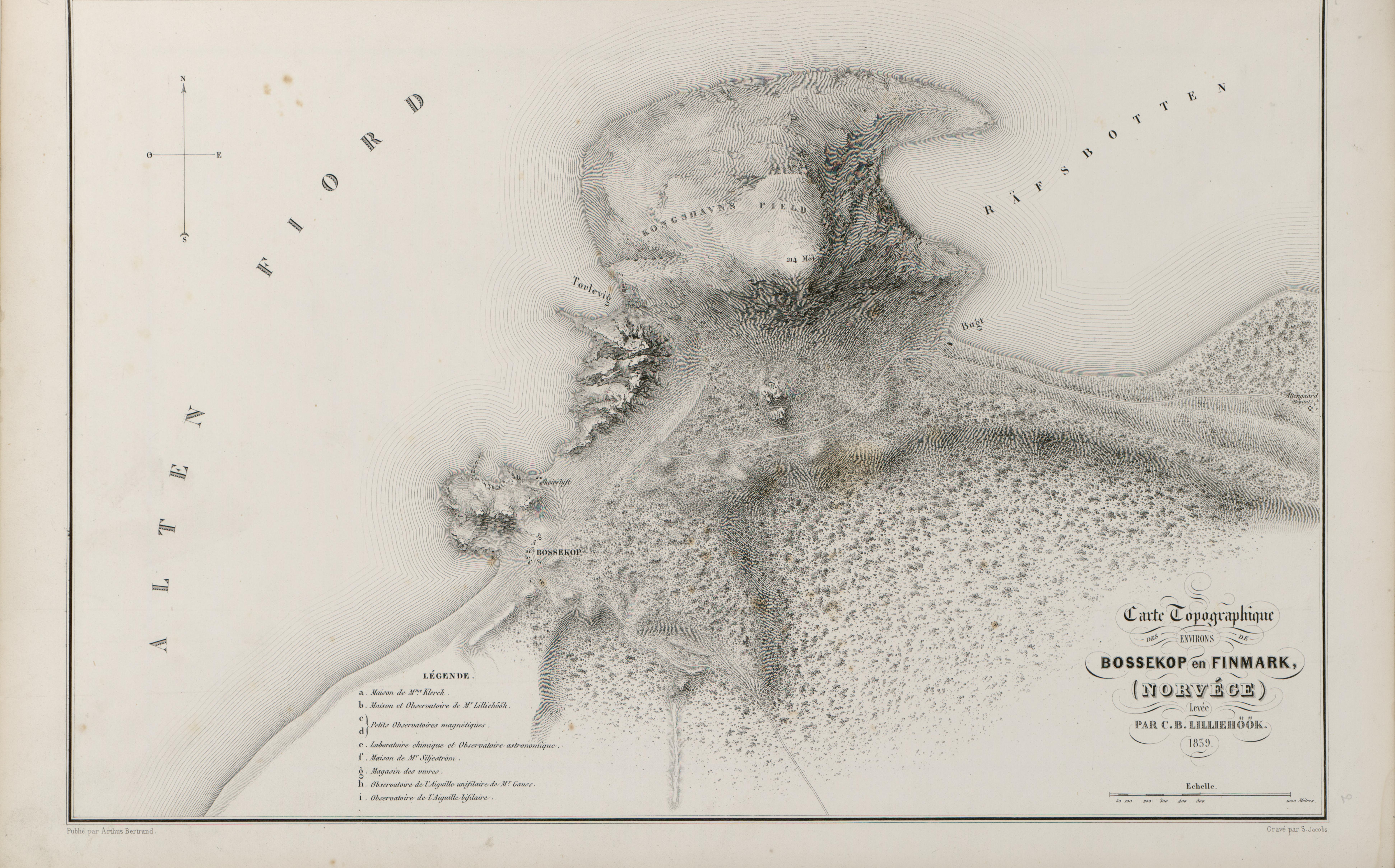 Illustrasjon hentet fra boken "Voyages de la Commission scientifique du Nord, en Scandinavie, en Laponie, au Spitzberg et aux Feröe" av ukjent forfatter og utgitt av Arthus BertrandParis : Arthus Bertrand, 1842-1855 (Paris, 185?)